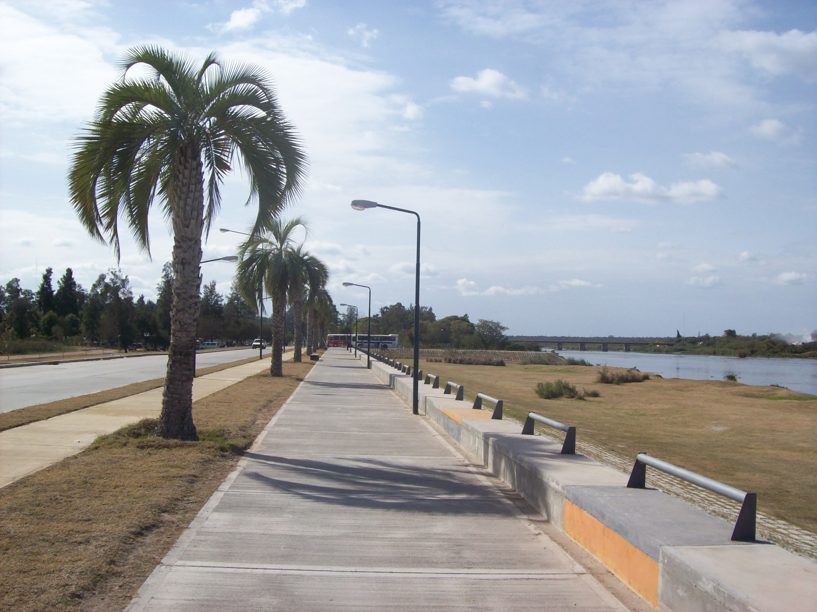 Costanera de la ciudad de Termas de Río Hondo en la margen izquierda del río Dulce en la provincia de Santiago del Estero, Argentina.